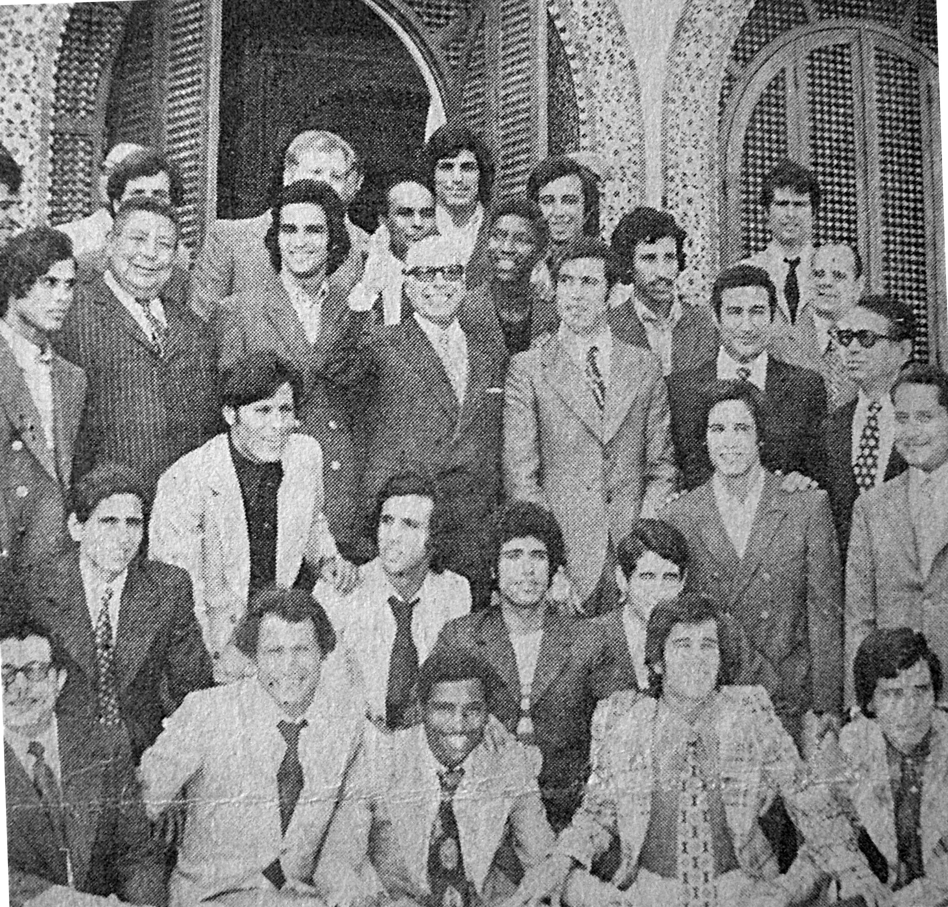 Le président Habib Bourguiba honore l'a sélection nationale tunisienne après avoir vaincu la Coupe Palestine en 1973 qui s'est déroulée en Libye